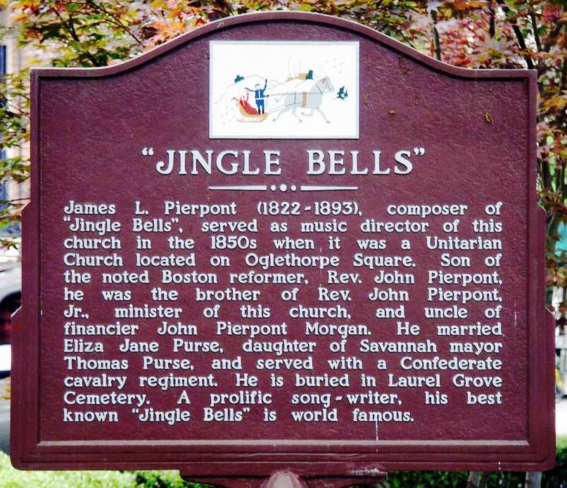 Schild Entstehung Jingle Bells